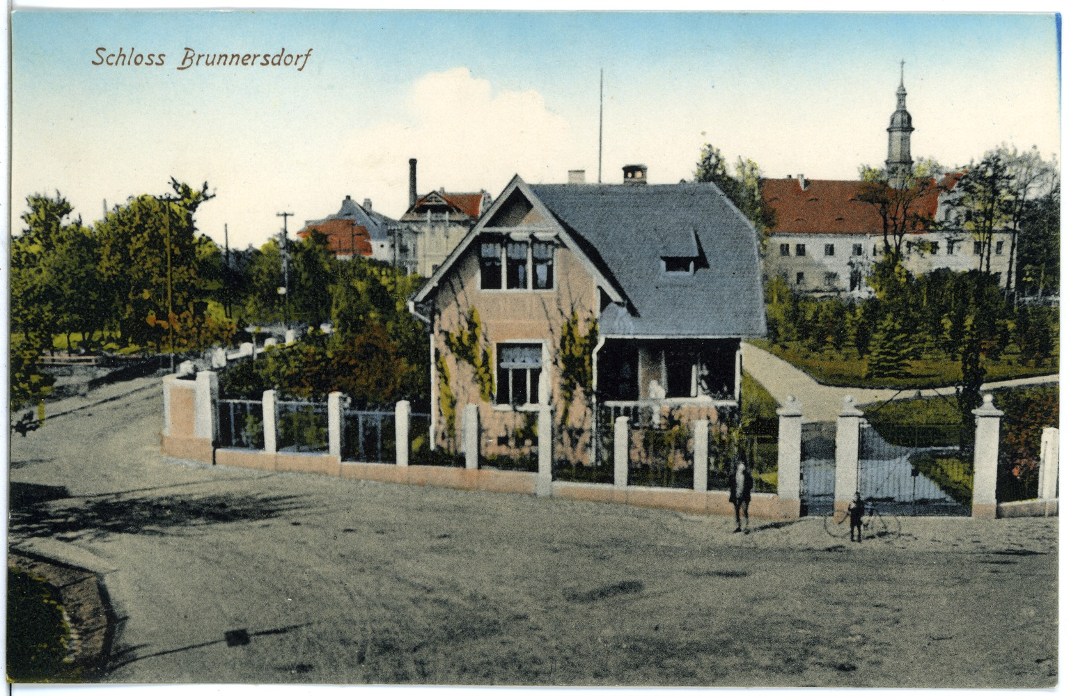 Brunnersdorf; Schloß This postcard is from publisher Brück & Sohn in Meißen ( postcard has a unique number 20164 and is available in a higher resolution at the publisher. This images was uploaded in a cooperation project between Wikipedians and the publisher.